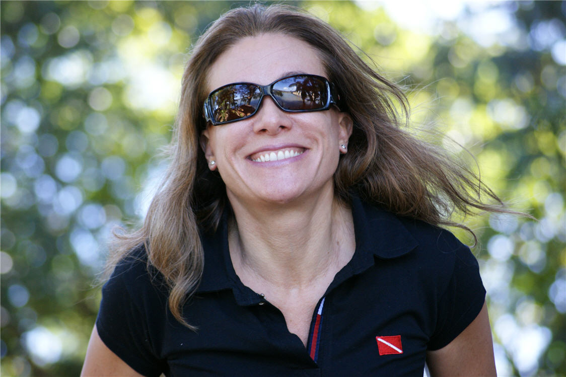 Maria Teresa Saenz Surita